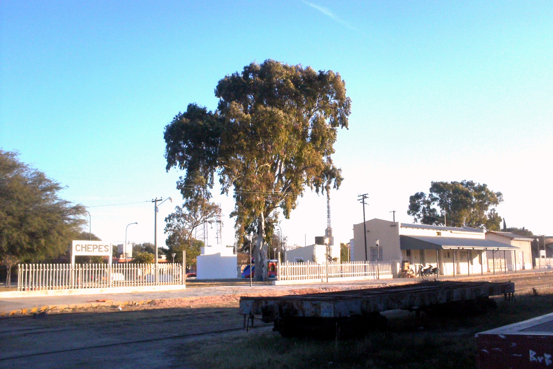 frente a la ruta de la estaciòn Chepes